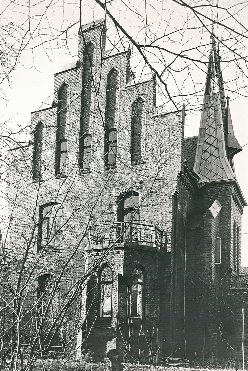 Tingstuveien 19d, tegnet av Bernhard Steckmest